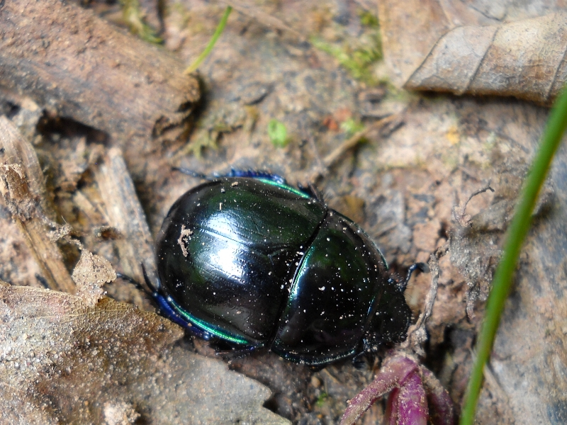 Trypocopris pyrenaeus pyrenaeus. Spain, Asturias, Covadonga.